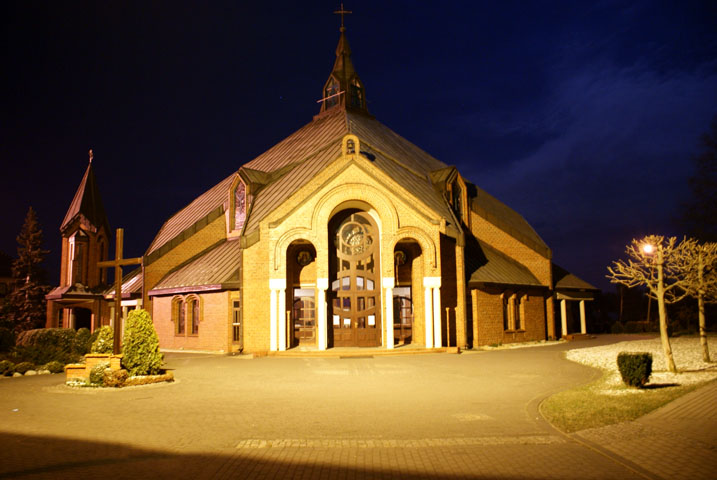 Kościół Najświętszego Serca Pana Jezusa w Piasku